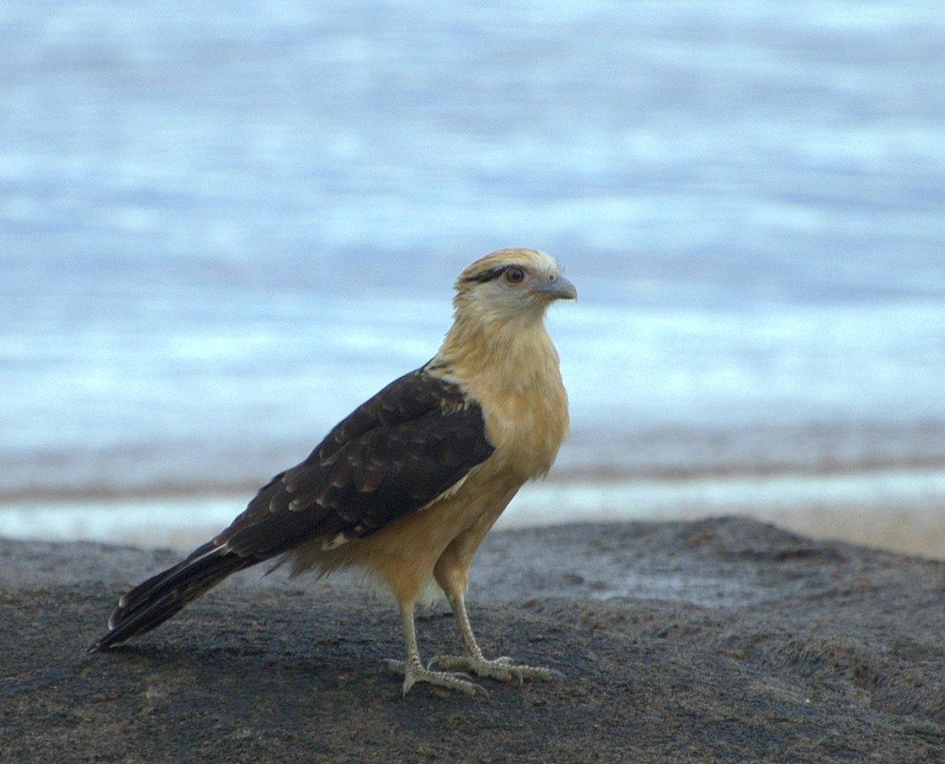 Milvago chimachima, Ilhabela-SP